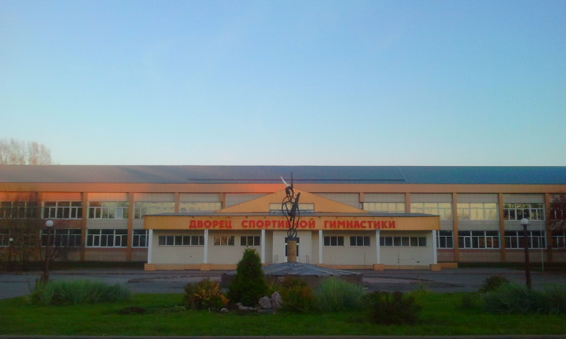 ДСГ